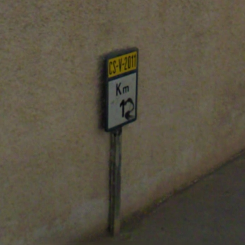 Antiguo indicador kilométrico de la CSV-2011